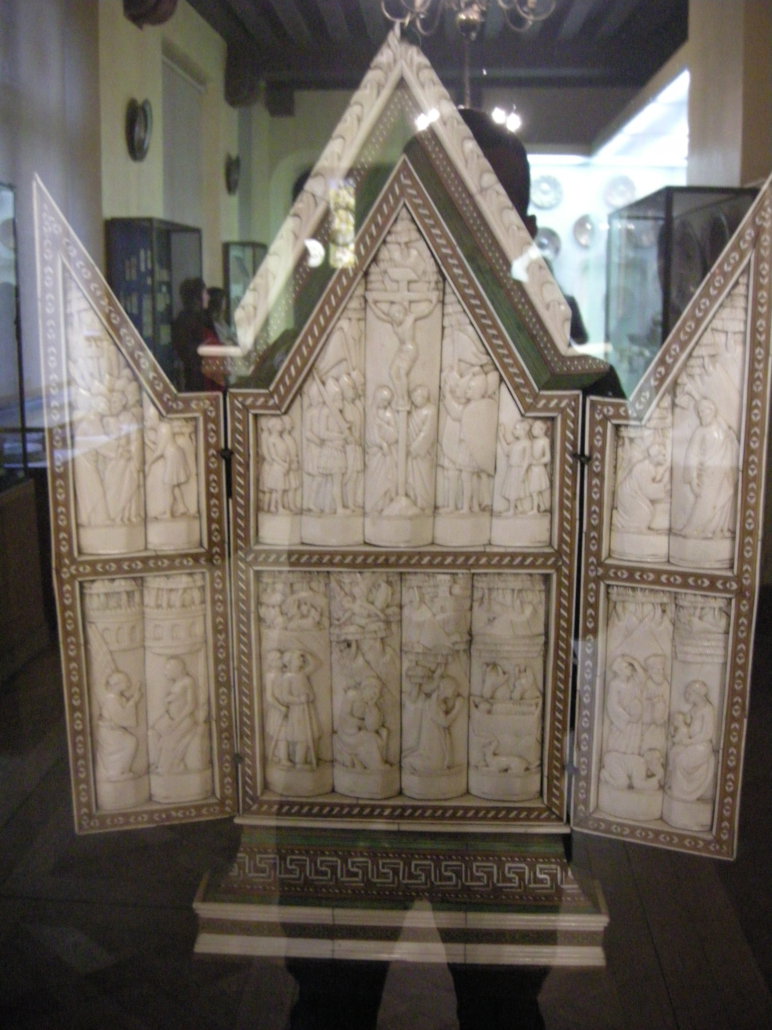 Mnma, bottega degli embriachi, trittico, inizio XV secolo